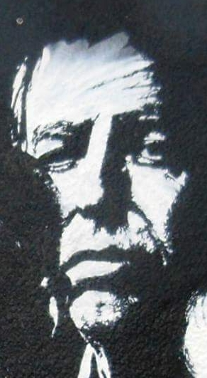 Bernard Maris (fresque)